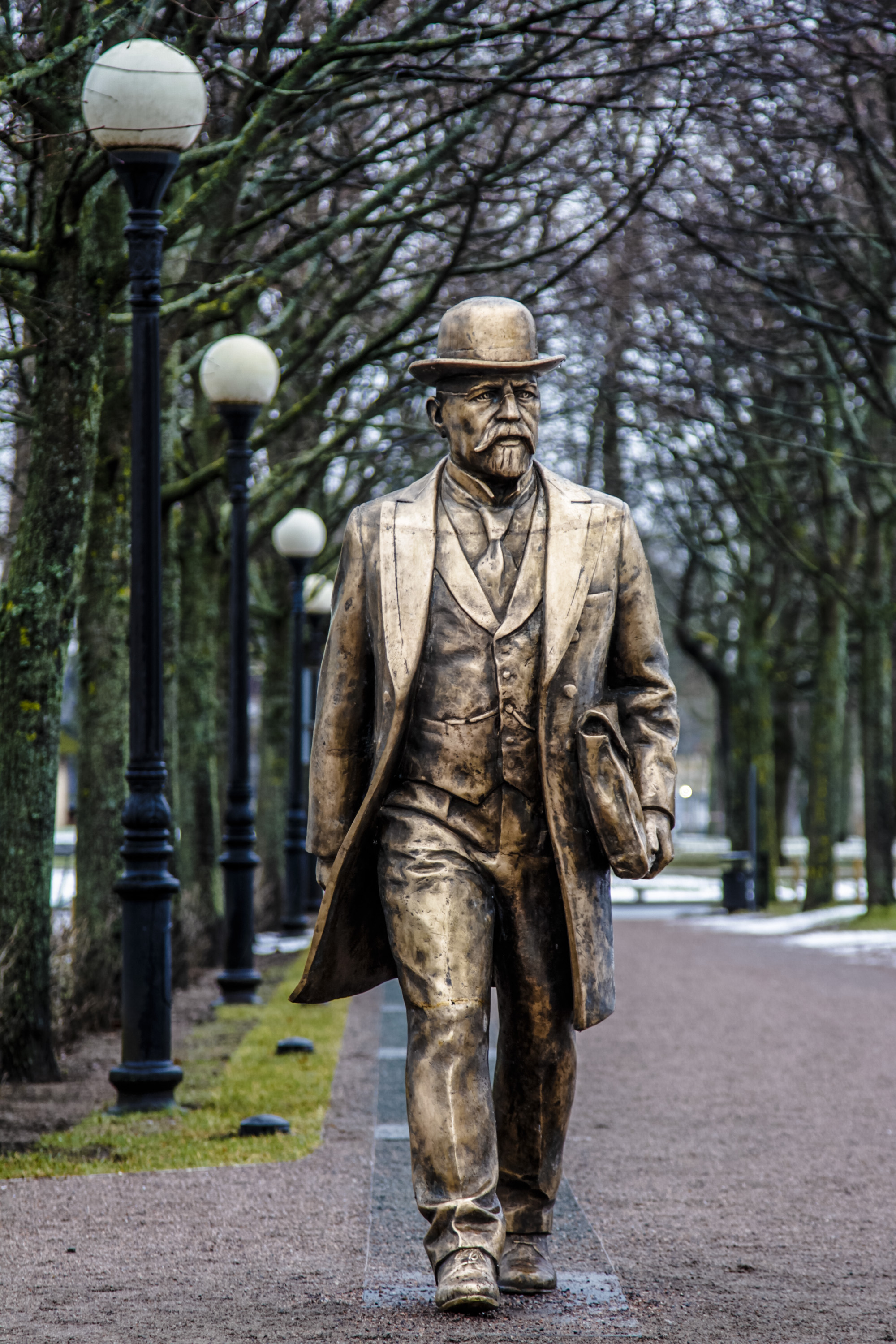 Jaan Poska monument Kadriorus, skulptor Elo Liiv